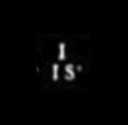 Initialen - Meistermarke des Gold- und Silberschmiedemeister in Augsburg, Joseph Ignaz Saler (* 1697; † 1764).